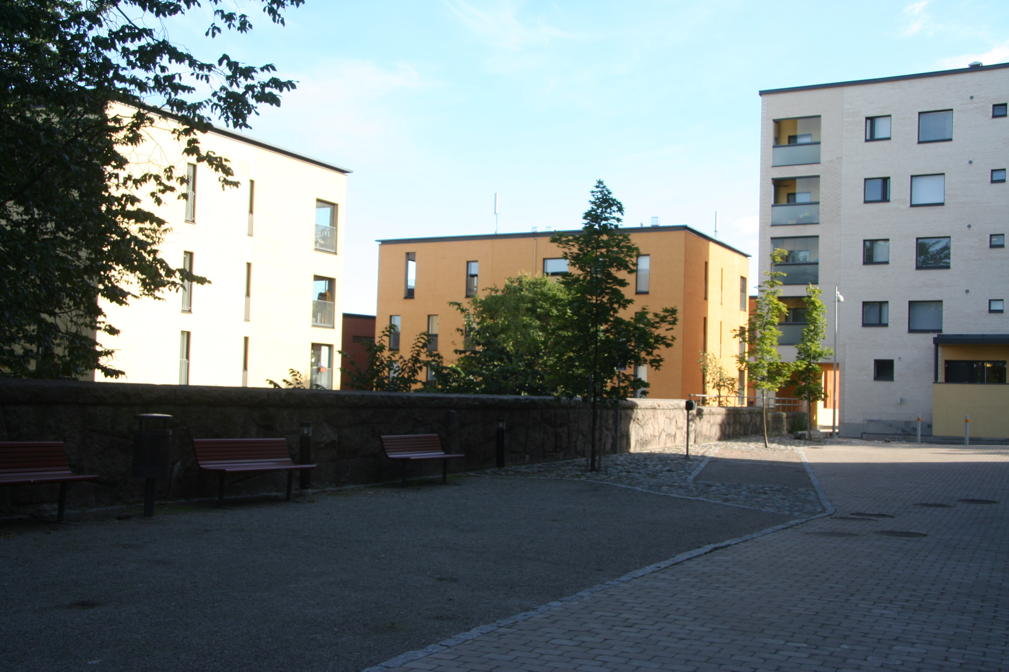 Hermanninvuori, Helsinki